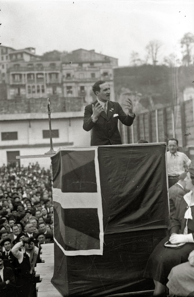 Jose Antonio Agirre 1933ko Aberri Egunean. Donostia, Gipuzkoa, Euskal Herria. Jose Antonio Agirre in 1933 Aberri Eguna. Donostia, Saint Sebastian, Gipuzkoa. Basque Country.